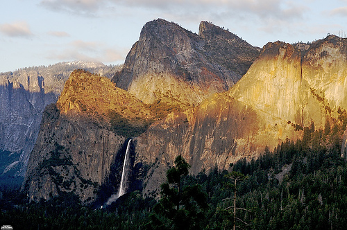 Vista do tunel de Yosemite